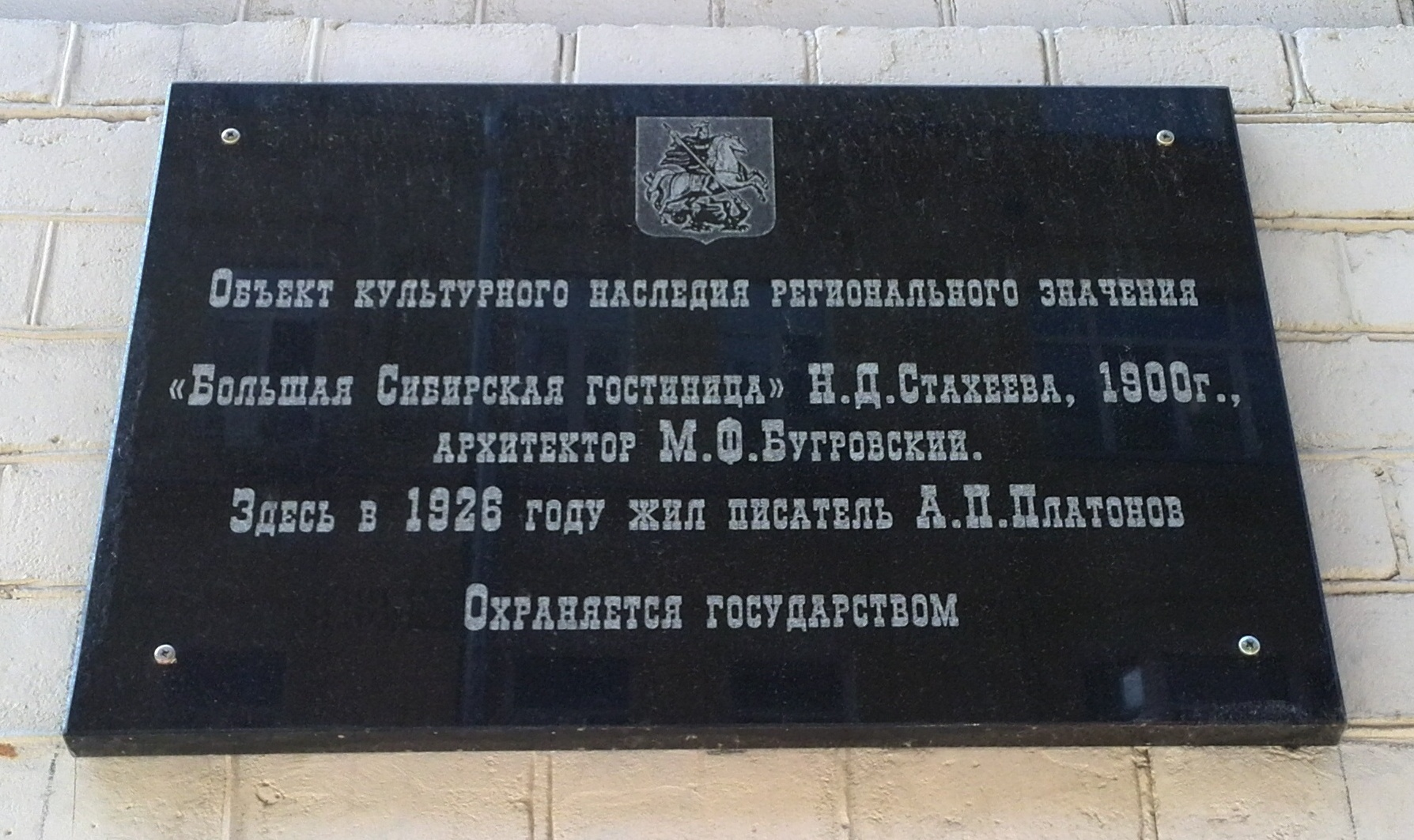 Мемориальная доска на «Большой Сибирской гостинице» Н. Д. Стахеева (1900, архитектор М. Ф. Бугровский; Большой Златоустинский переулок, №6/6), объекте культурного наследия регионального значения. В 1926 году здесь жил писатель А. П. Платонов.